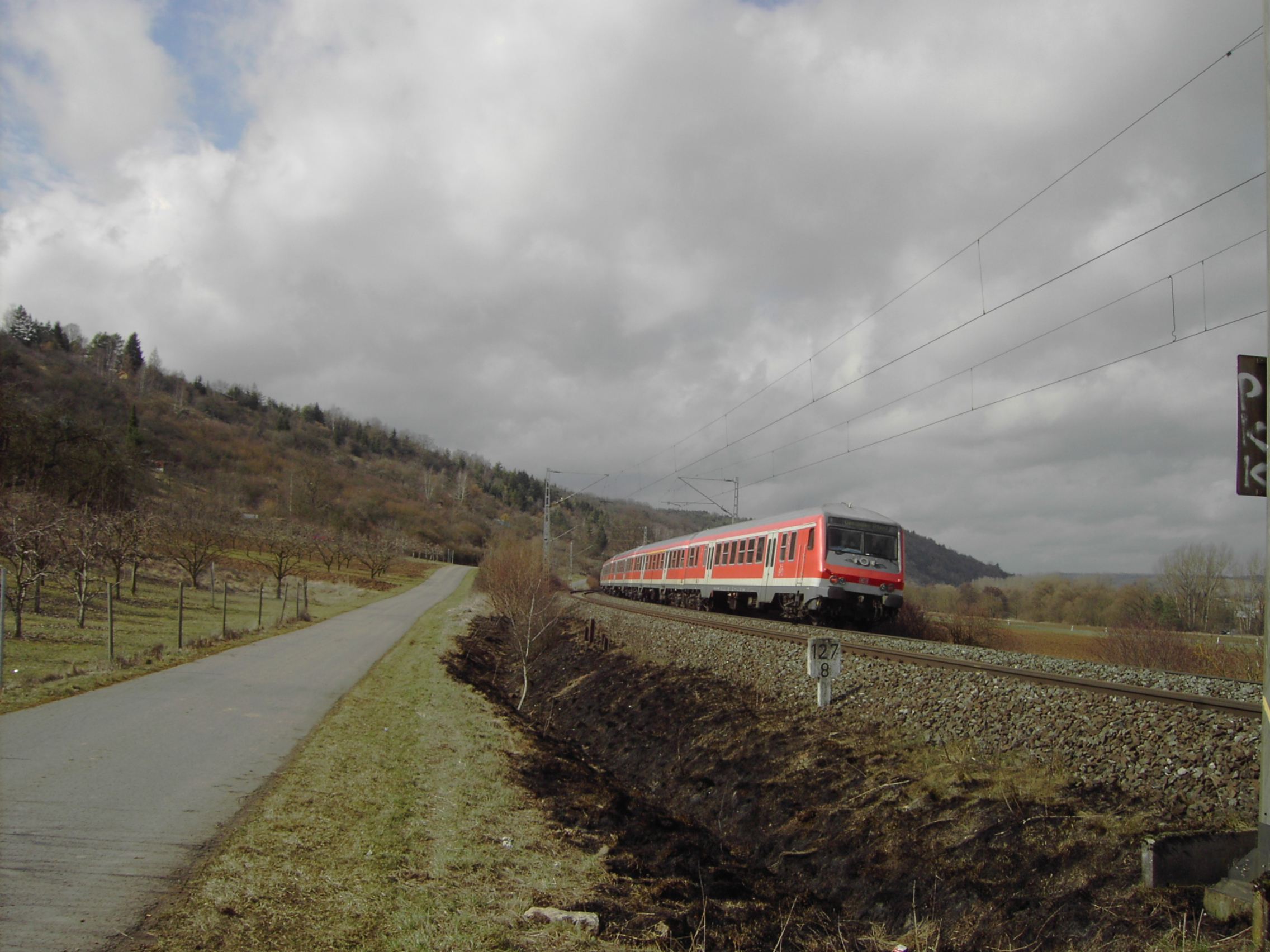 Ein Vier-Wagen-Wendezug, bespannt mit einer Lokomotive der Baureihe 112, als RegionalBahn Treuchtlingen - Würzburg - Gemünden (Main) zwischen Winterhausen und Würzburg-Heidingsfeld.